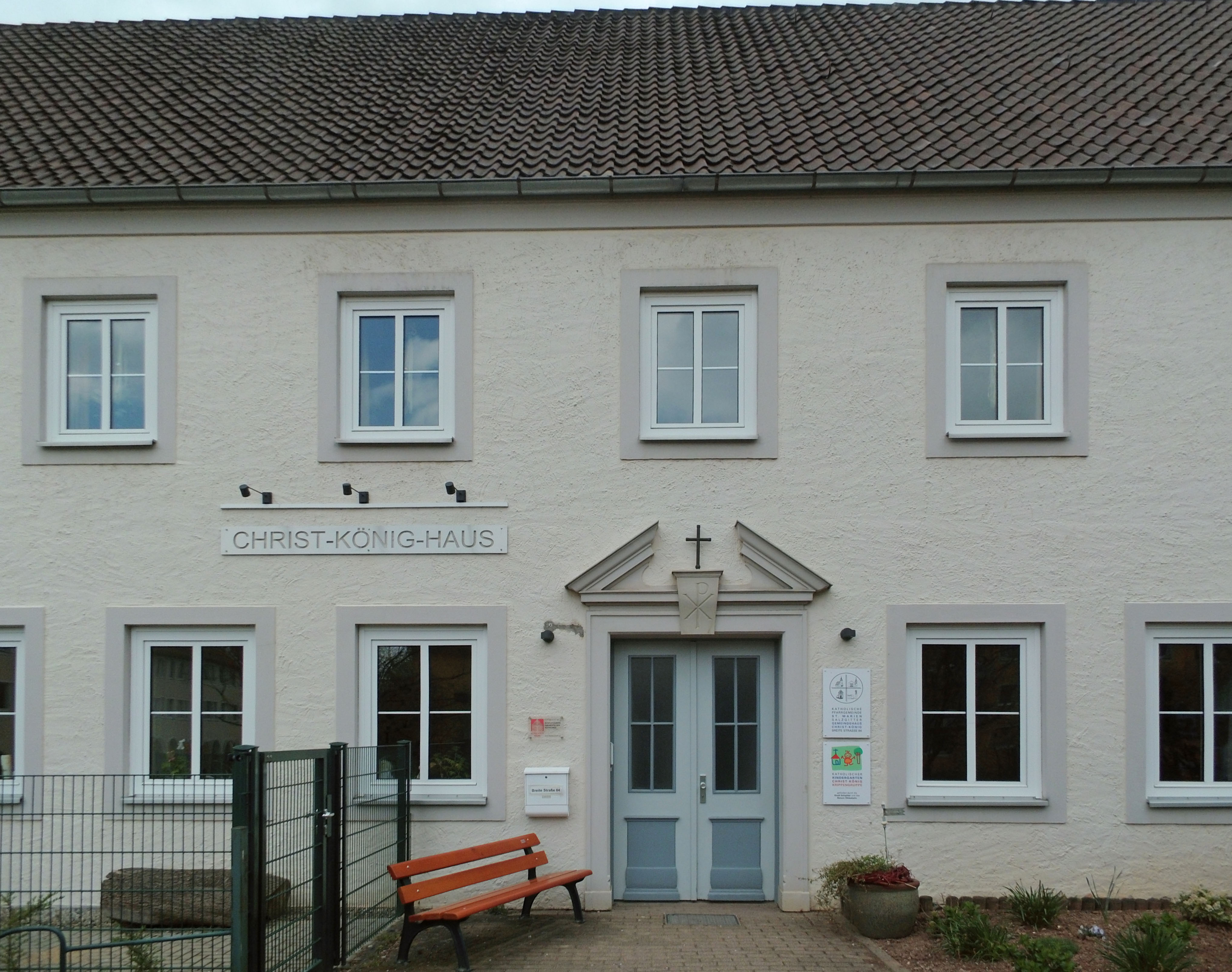 Katholisches Christ-König-Haus in Salzgitter-Bad (Teilansicht).